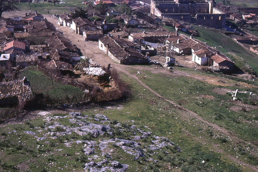 Selçuk village and Isa Bey mosque from the castle in 1970